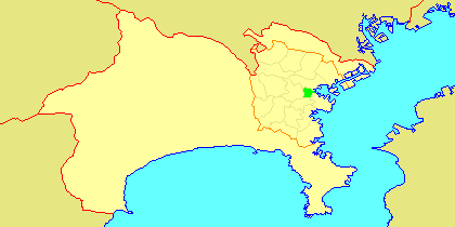 Map of Nishi-ku, Yokohama, Kanagawa-prefecture, Japan